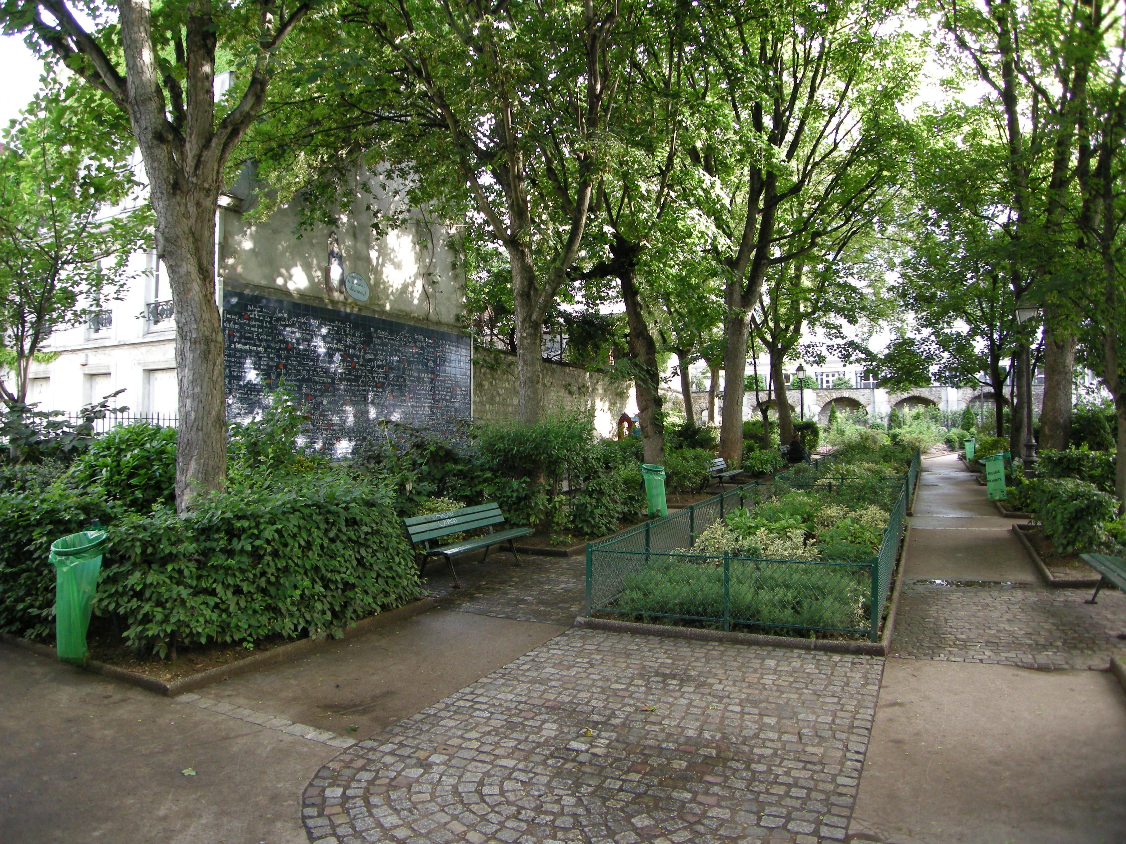 Square Jehan Rictus, Paris XVIIIe, France